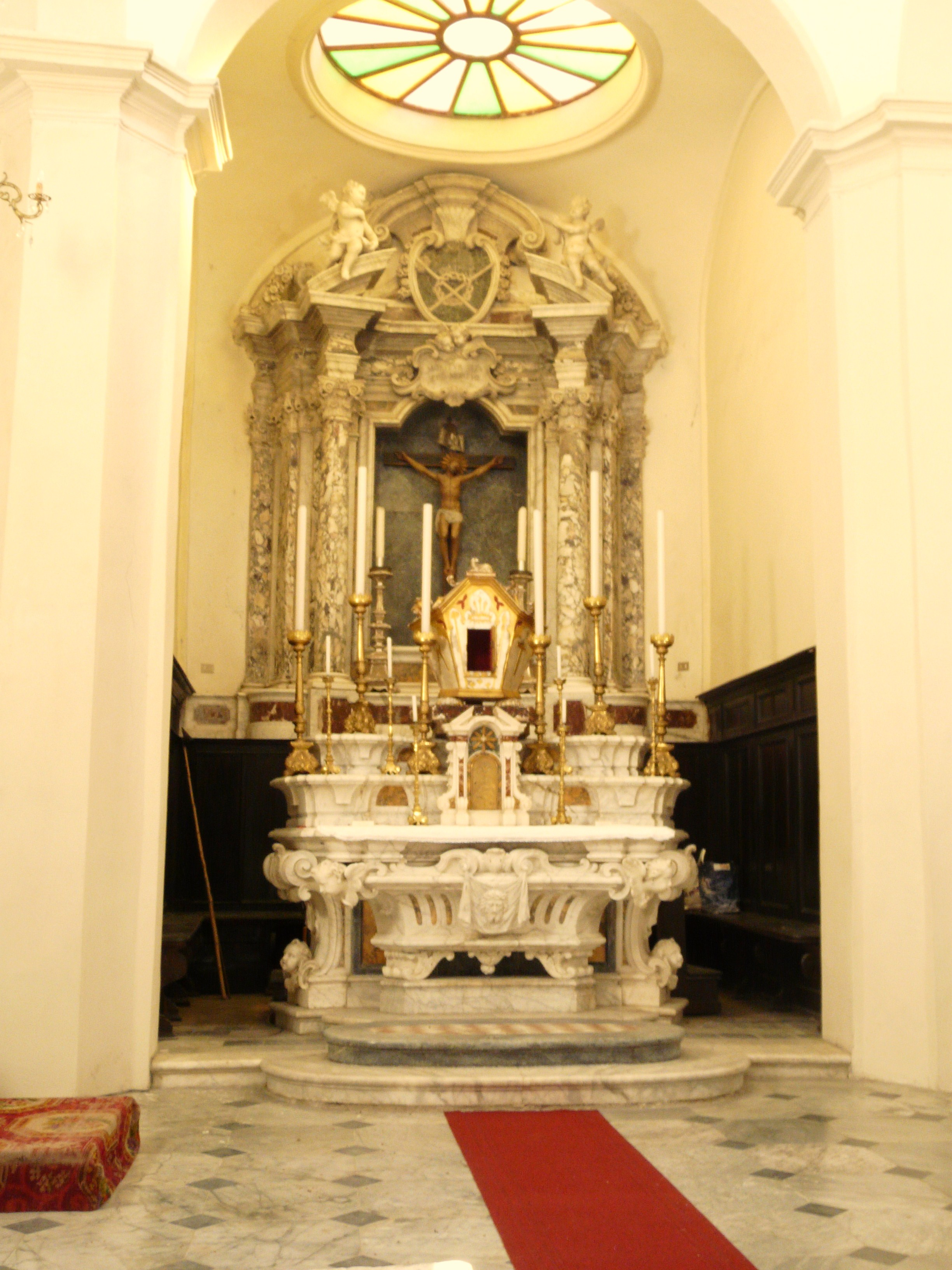 Chiesa-Santuario di San Remigio, Fosdinovo, Toscana, Italia